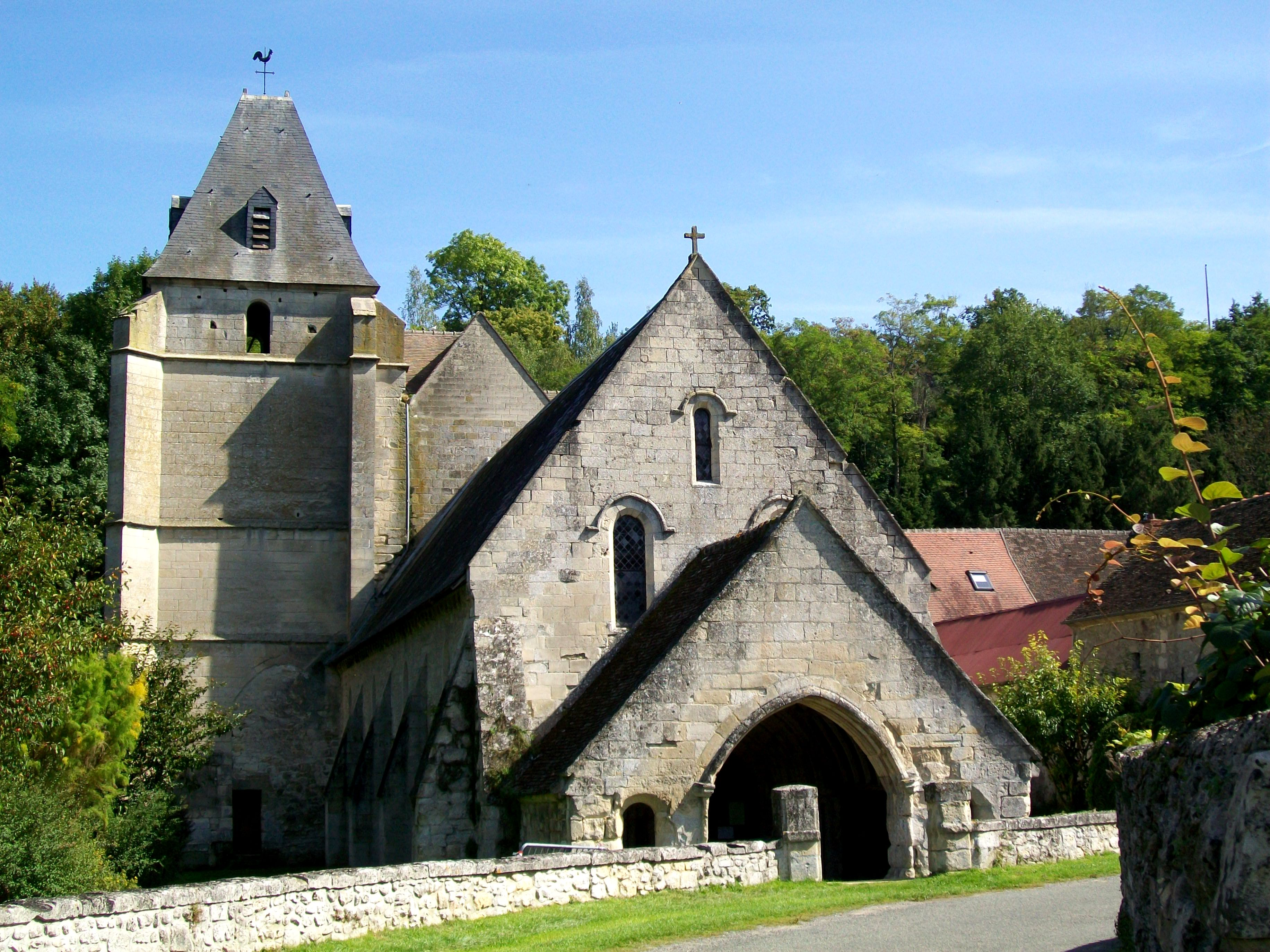 Vue depuis l'ouest.